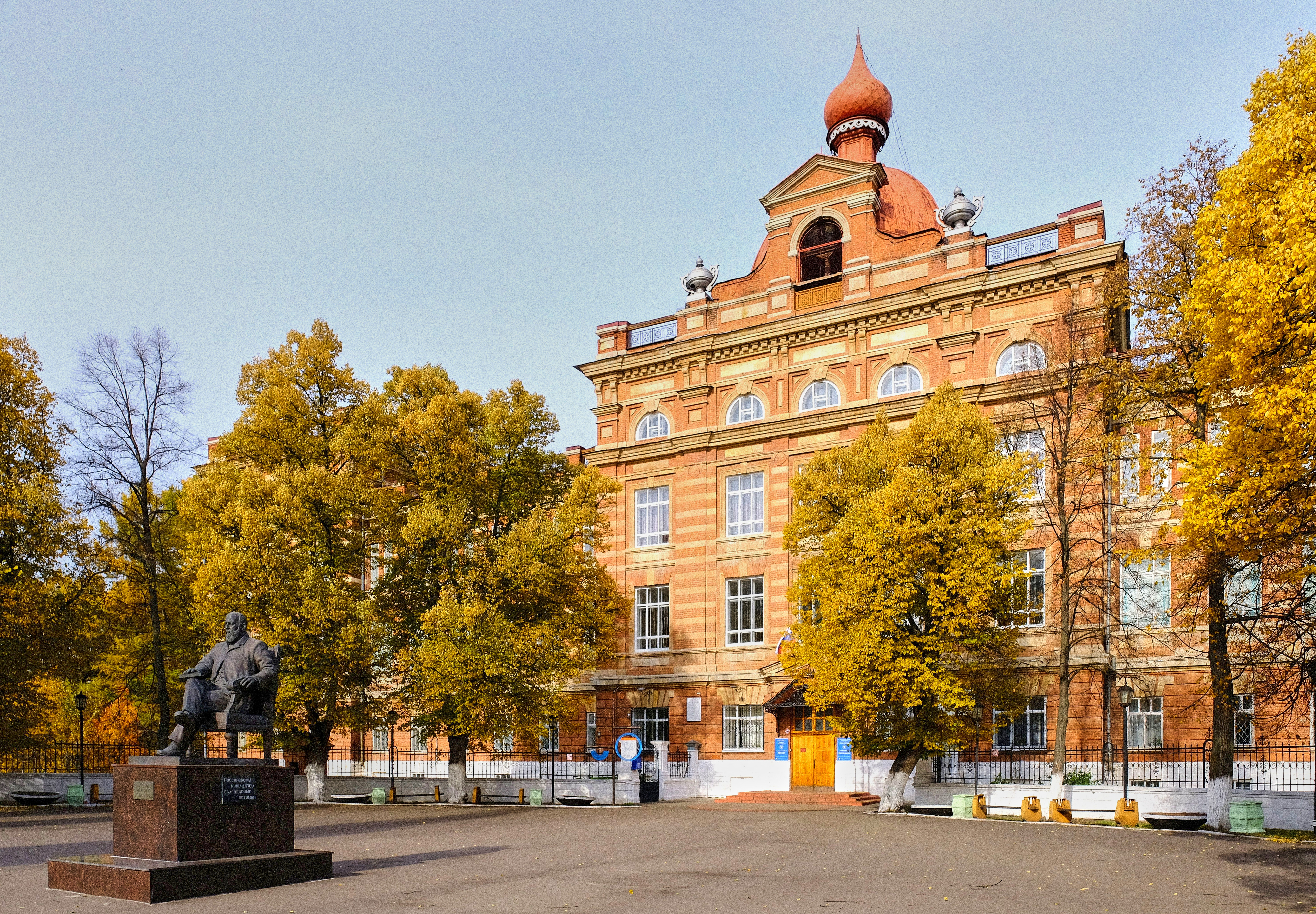 Здание Елабужского института Казанского федерального университета